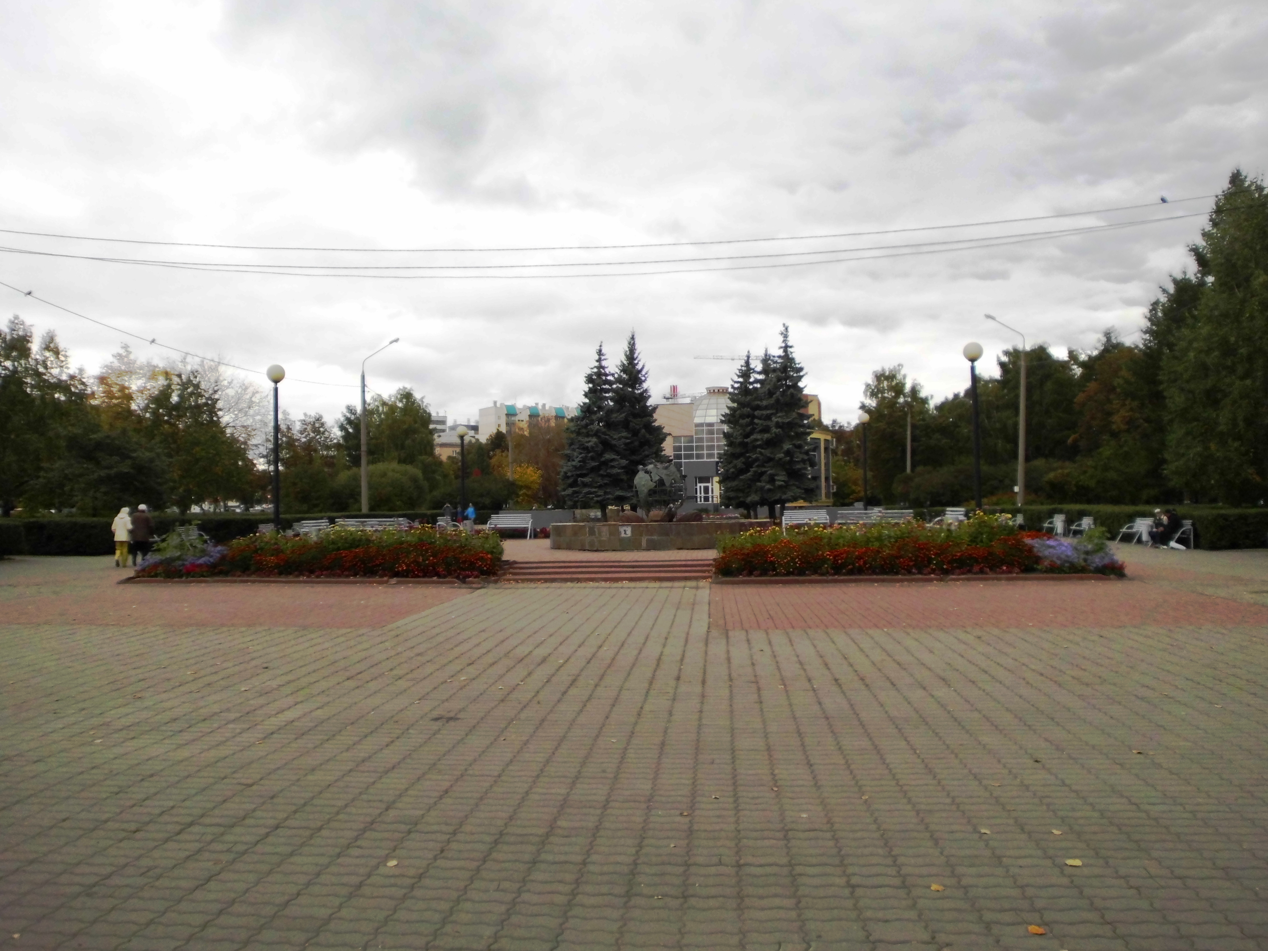 Сквер им. С. С. Андреевского (исследовал сибирскую язву во время эпидемии в Челябинске) в городе Челябинске. Улицы Воровского, Худякова, Энгельса. Вид со стороны ул. Воровского. Справа расположены 2 общежития Южно-Уральского государственного медицинского университета.